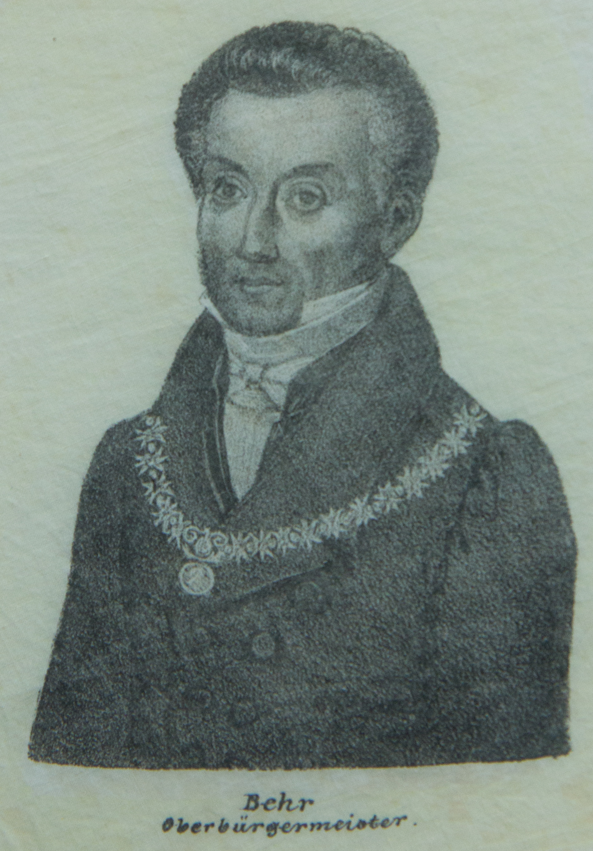 Hambacher Tuch, fotografiert im Archiv des Liberalismus in Gummersbach: Wilhelm Joseph Behr (1775-1851)